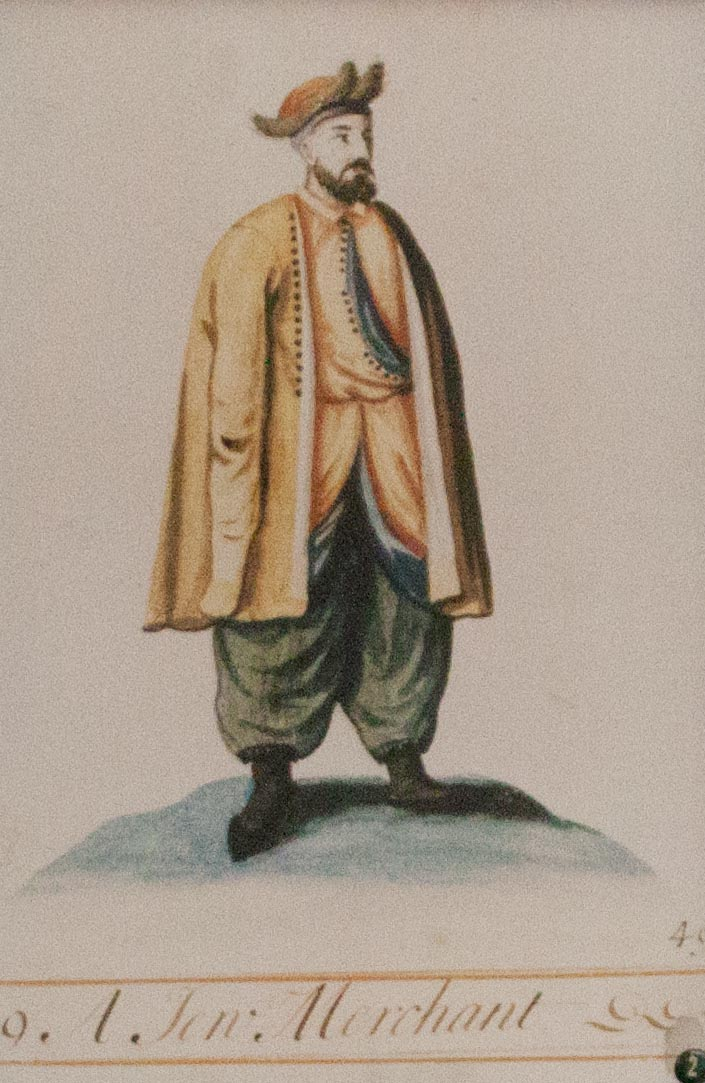 Costume d'un marchand juif de Hongrie, XVIII° s.